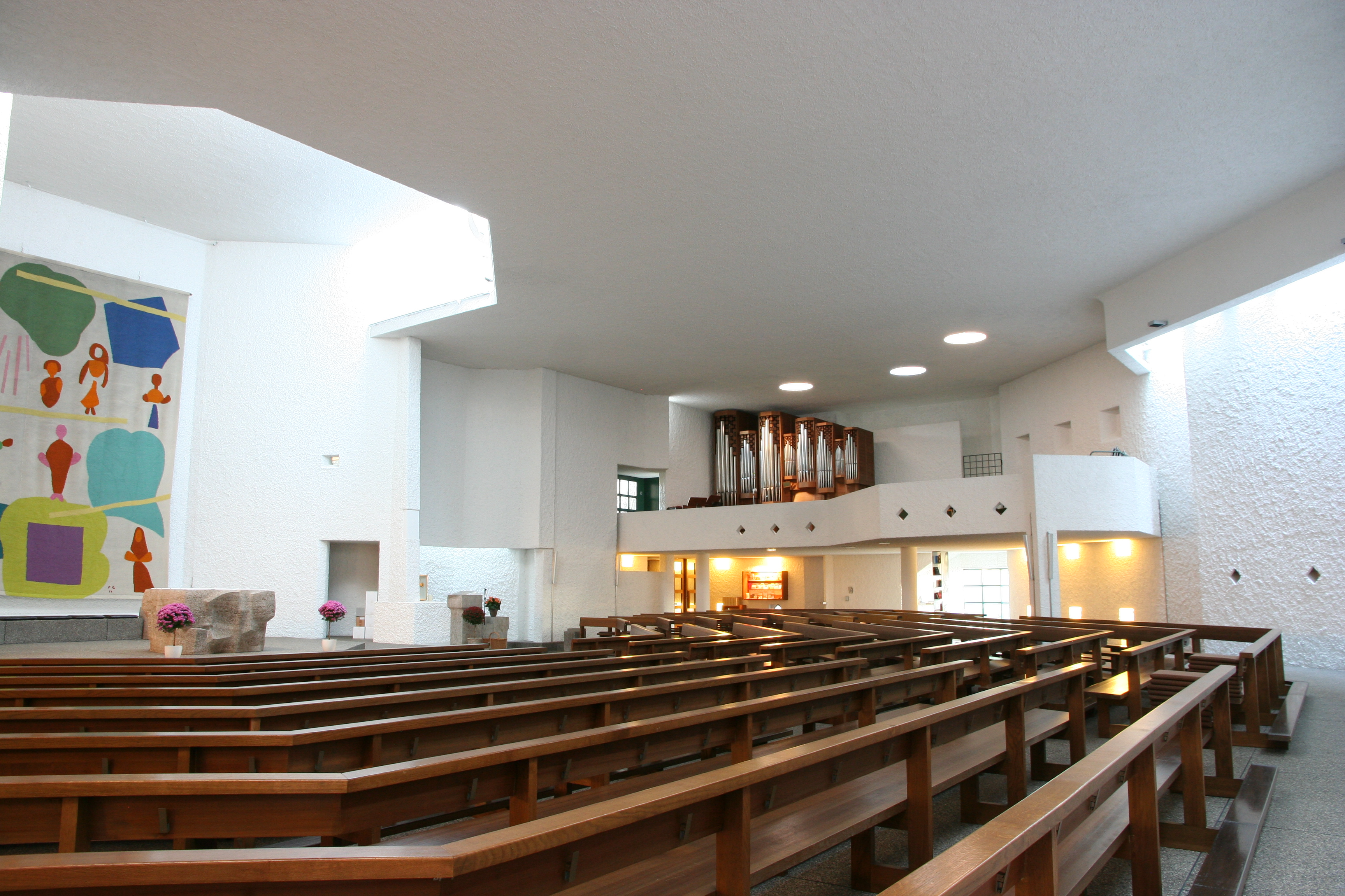 Römisch-katholische Kirche St. Peter und Paul Rotmonten